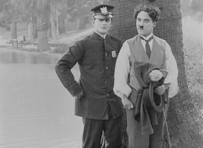 Edwin Frazee et Charlie Chaplin dans "Charlot rival d'amour" (Those love pangs) (1914)